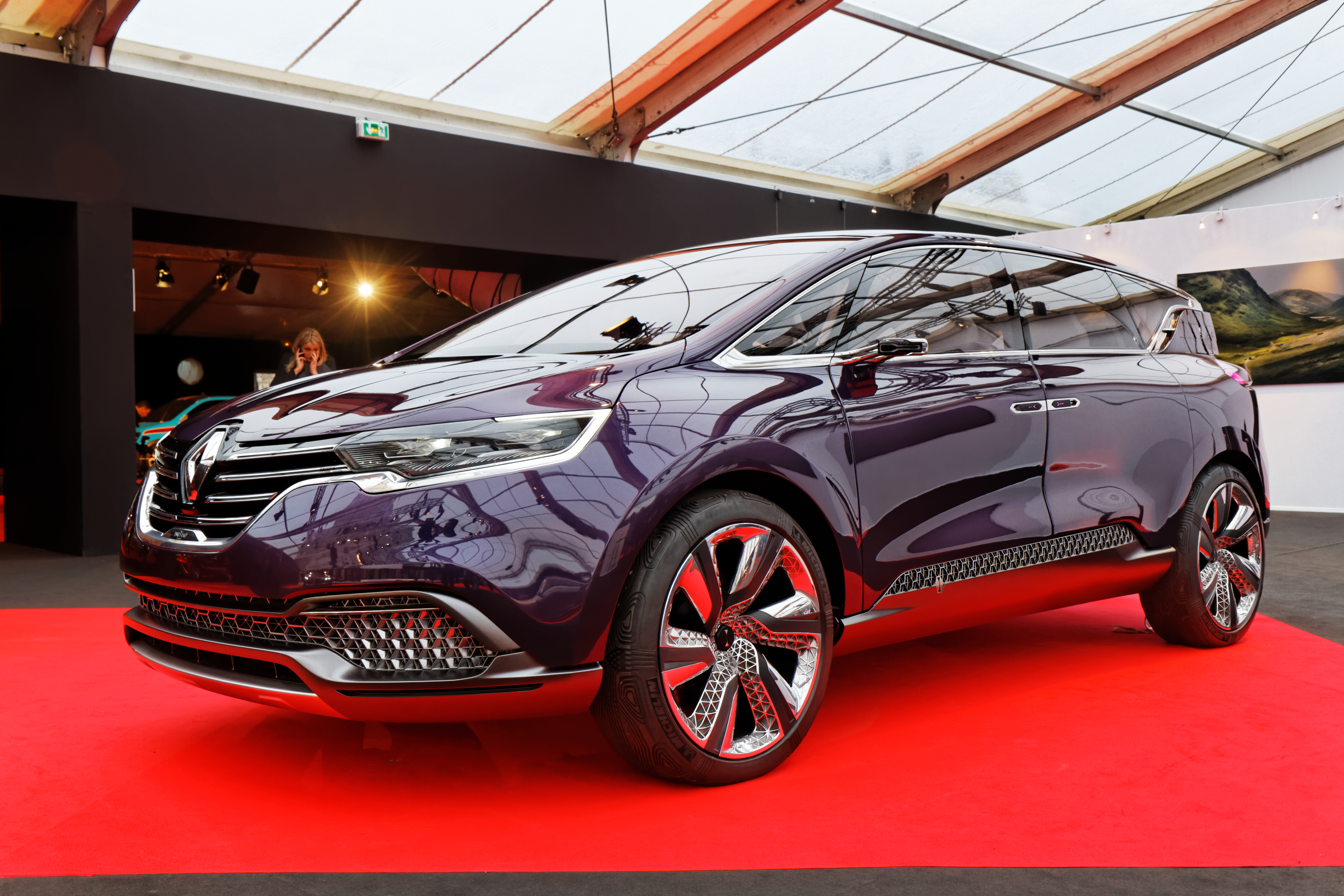 La Renault Initiale Paris exposée lors du festival automobile international 2014.